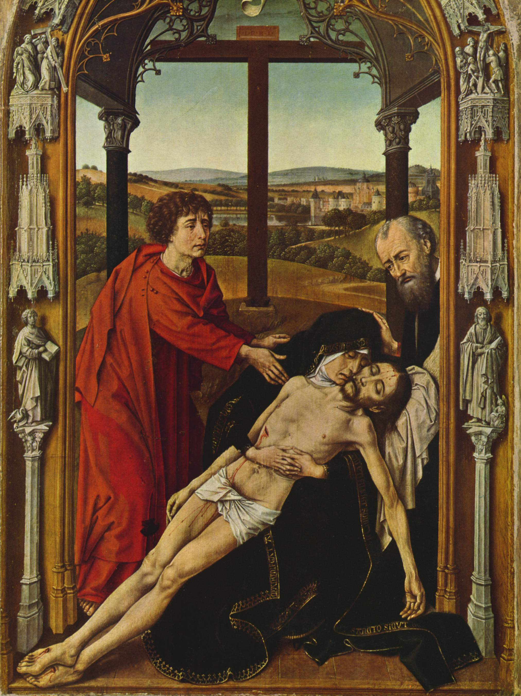 La obra representa a Jesucristo muerto y descansando en los brazos de su madre, la Virgen María, y es una copia de una de las tablas del retablo de Miraflores, que fue ejecutado por Rogier van der Weyden.